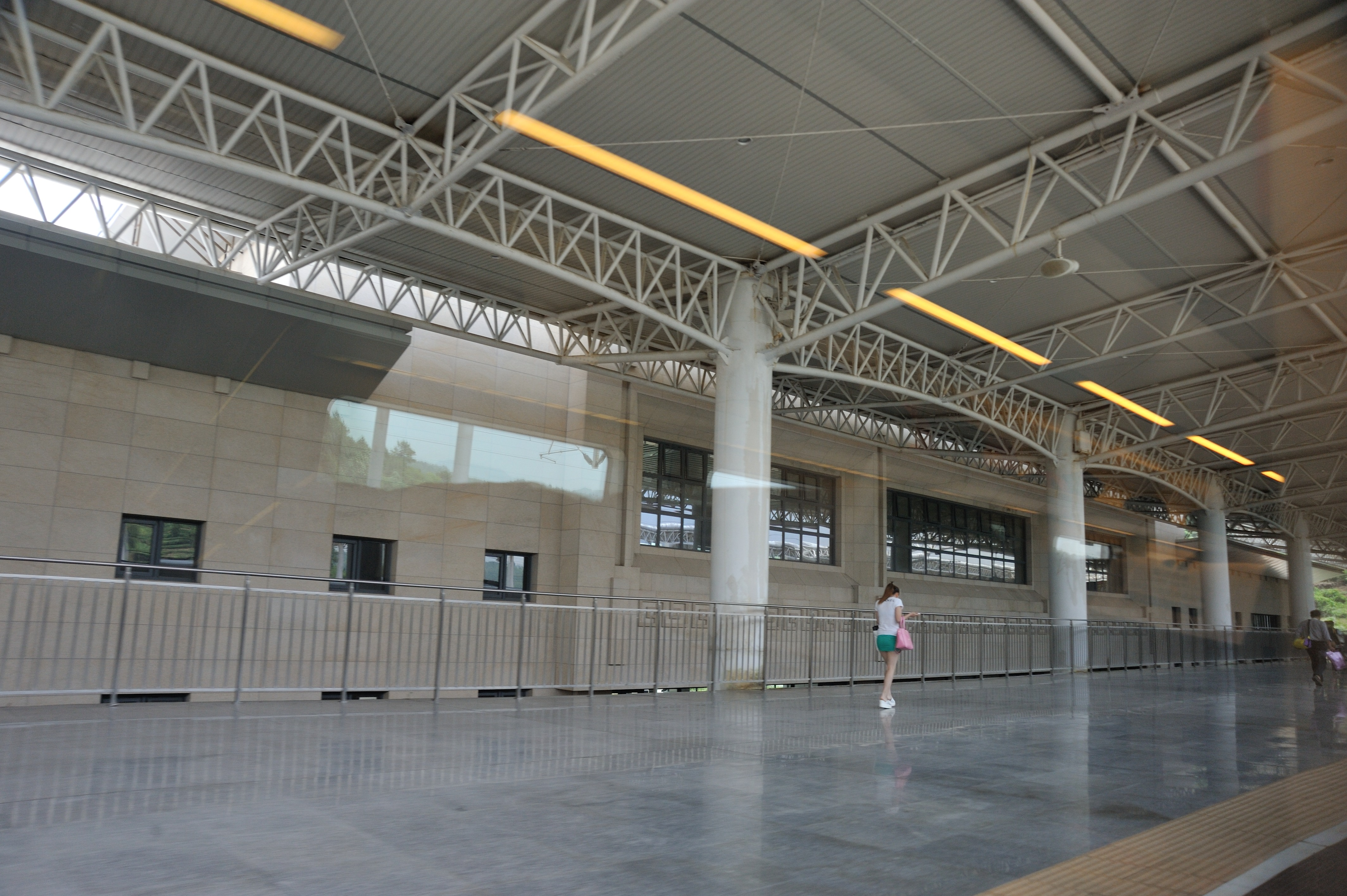 福鼎站站台